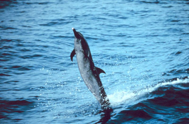 a pantropical spotted dolphin